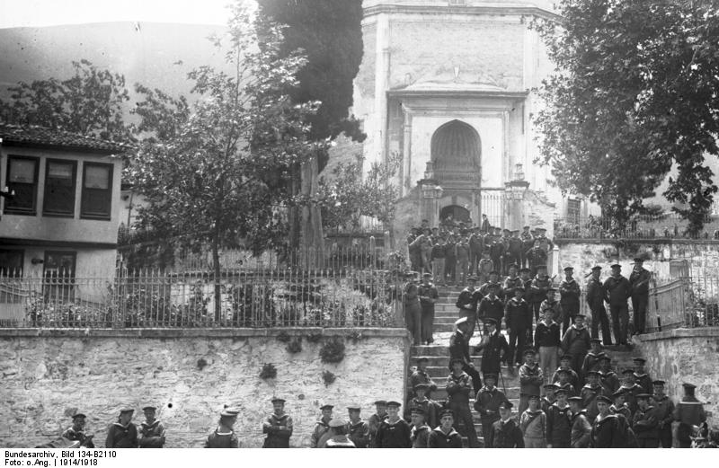 Türkei, Besatzung des Kreuzers Breslau Kleiner Kreuzer Breslau Stapell.: 16.5.1911 Besatzung in der Türkei an Land